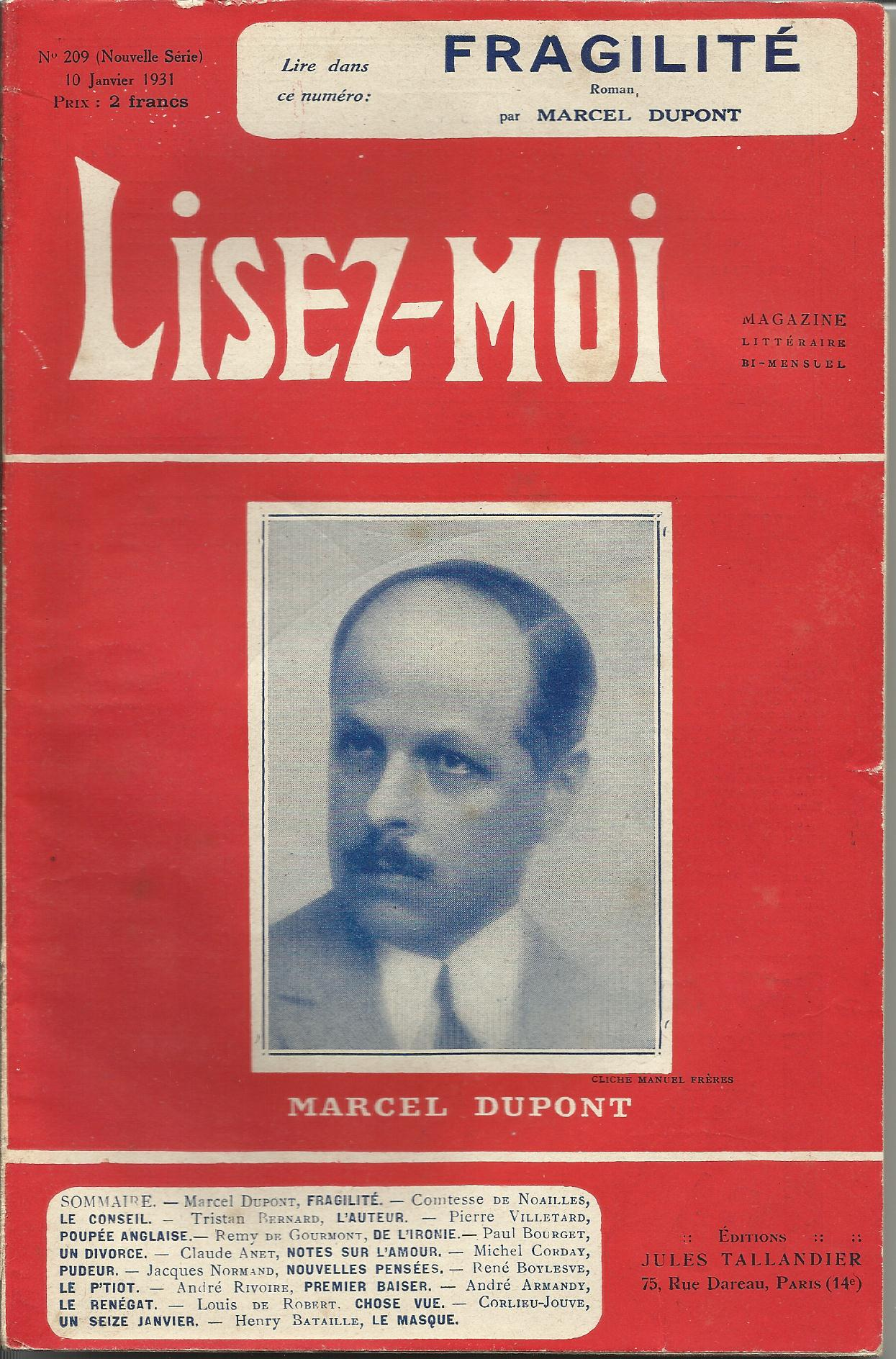 Magazine littérature bi-mensuel